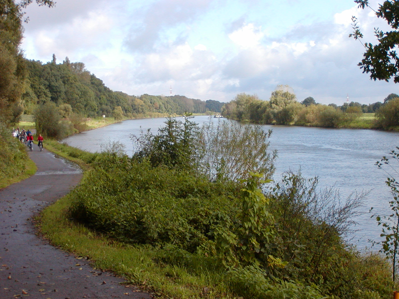 Weserradweg an der Weser bei Minden-Todtenhausen, Nordrhein-Westfalen